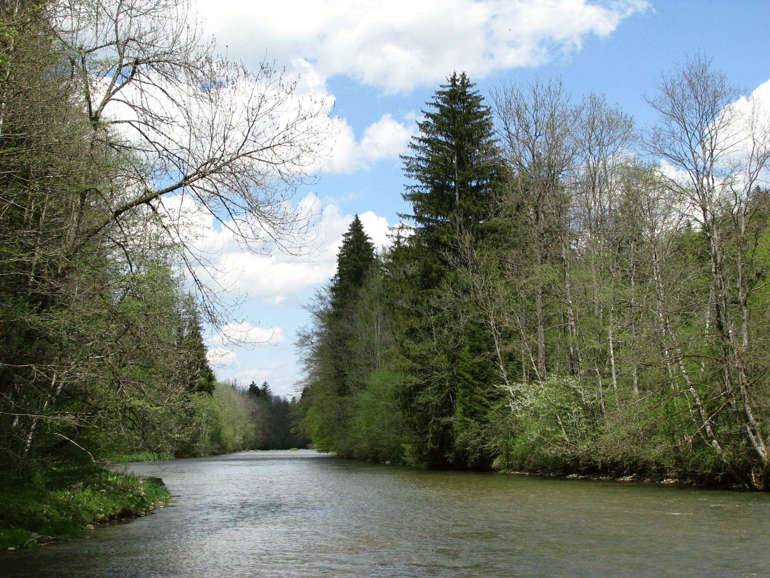 Die Wertach unterhalb des Burgstalls bei Eichelschwang; flussabwärts (nach Norden) gesehen.